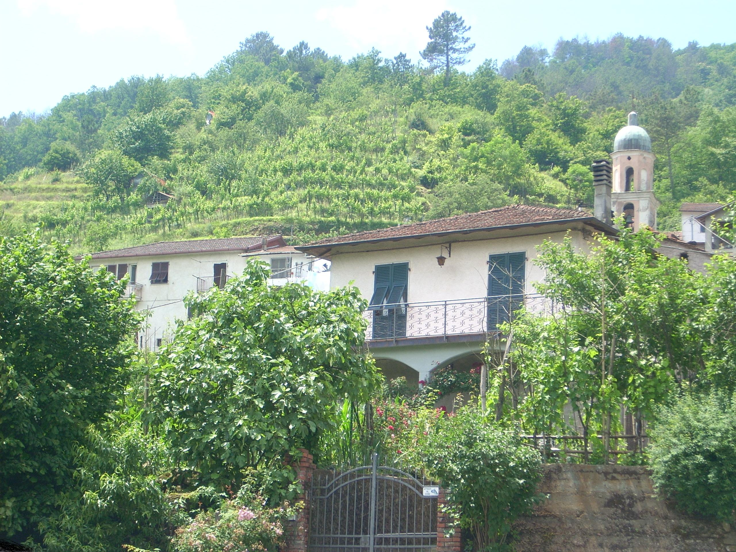 Vista dalla piazzetta di Mangia.